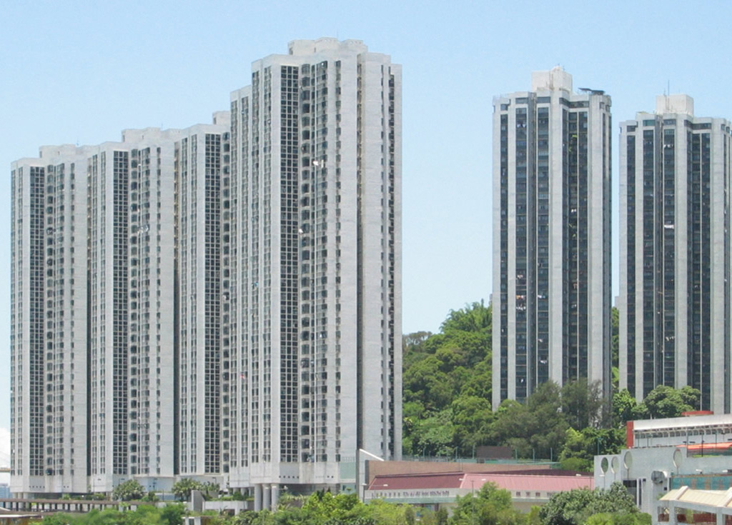 Bayview Garden